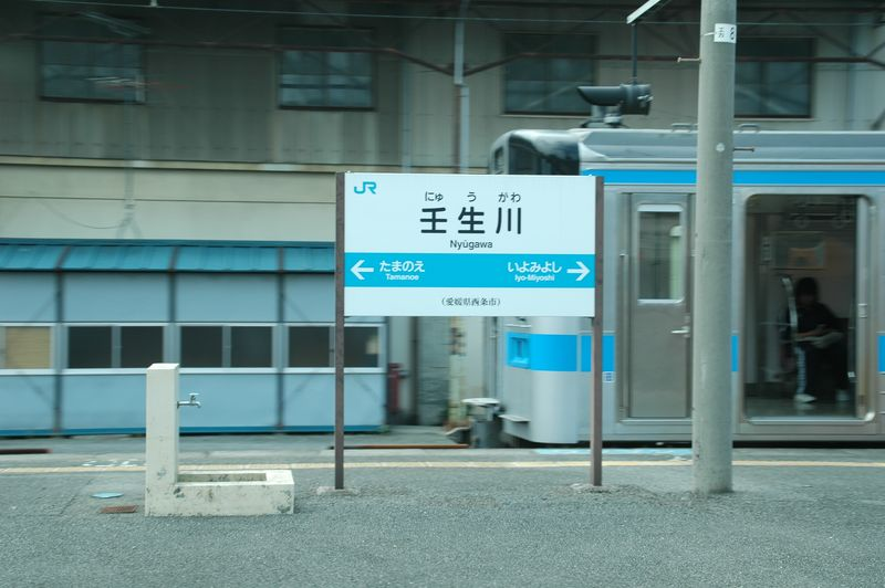 JR-Shikoku(JAPAN) Yosan-Line,Nyugawa STA. Station name sign